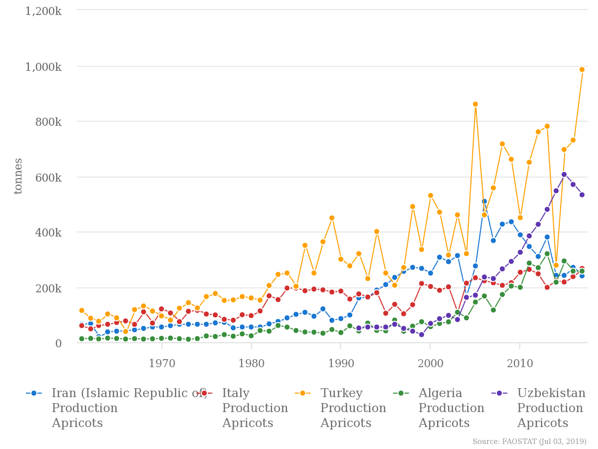 apricot